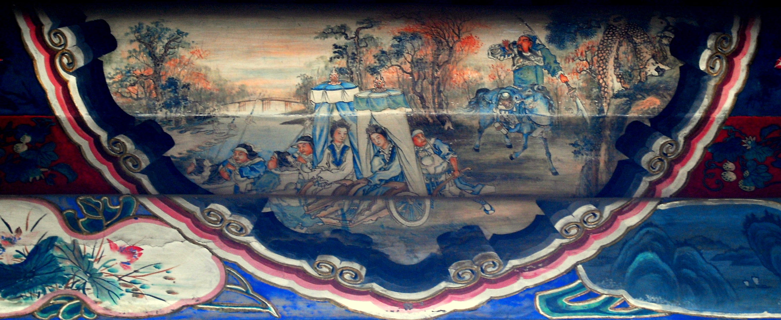 Quan Vân Trường đưa đường hai phu nhân của Lưu Bị, đi qua năm cửa quan chém sáu tướng - Trường lang Di Hòa Viên, Bắc Kinh.